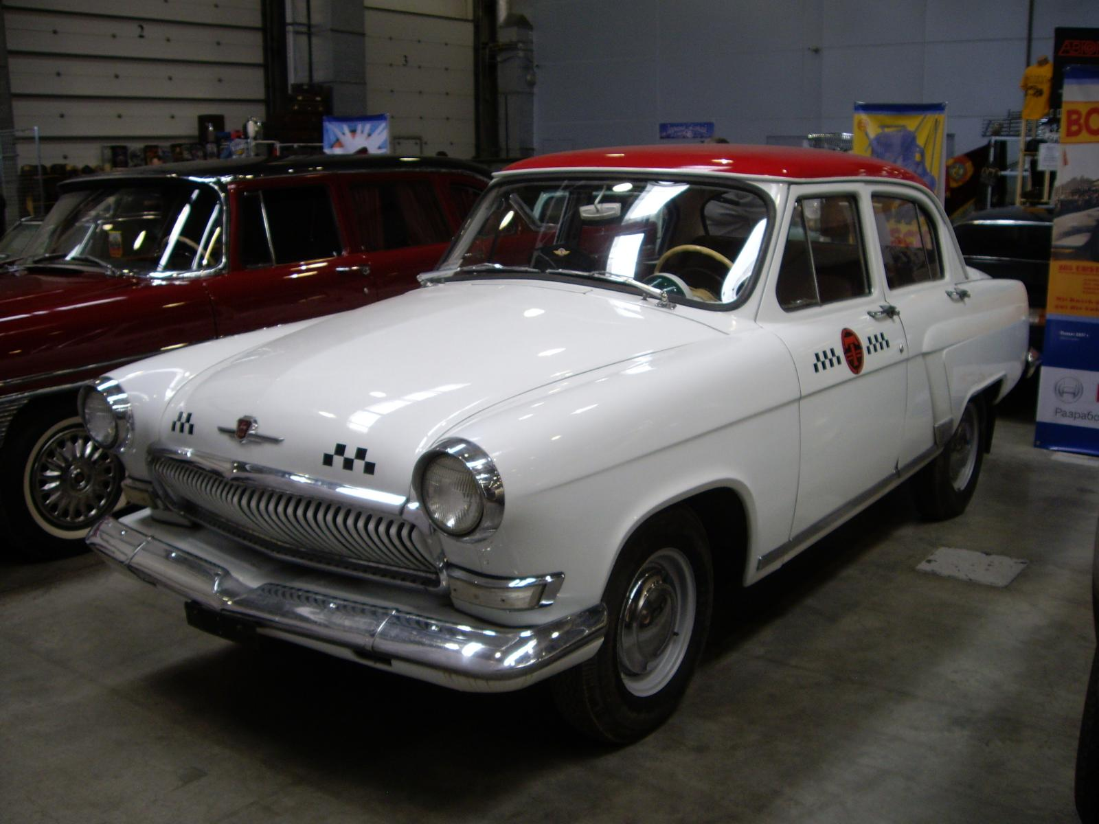 GAZ-21 Volga taxi car